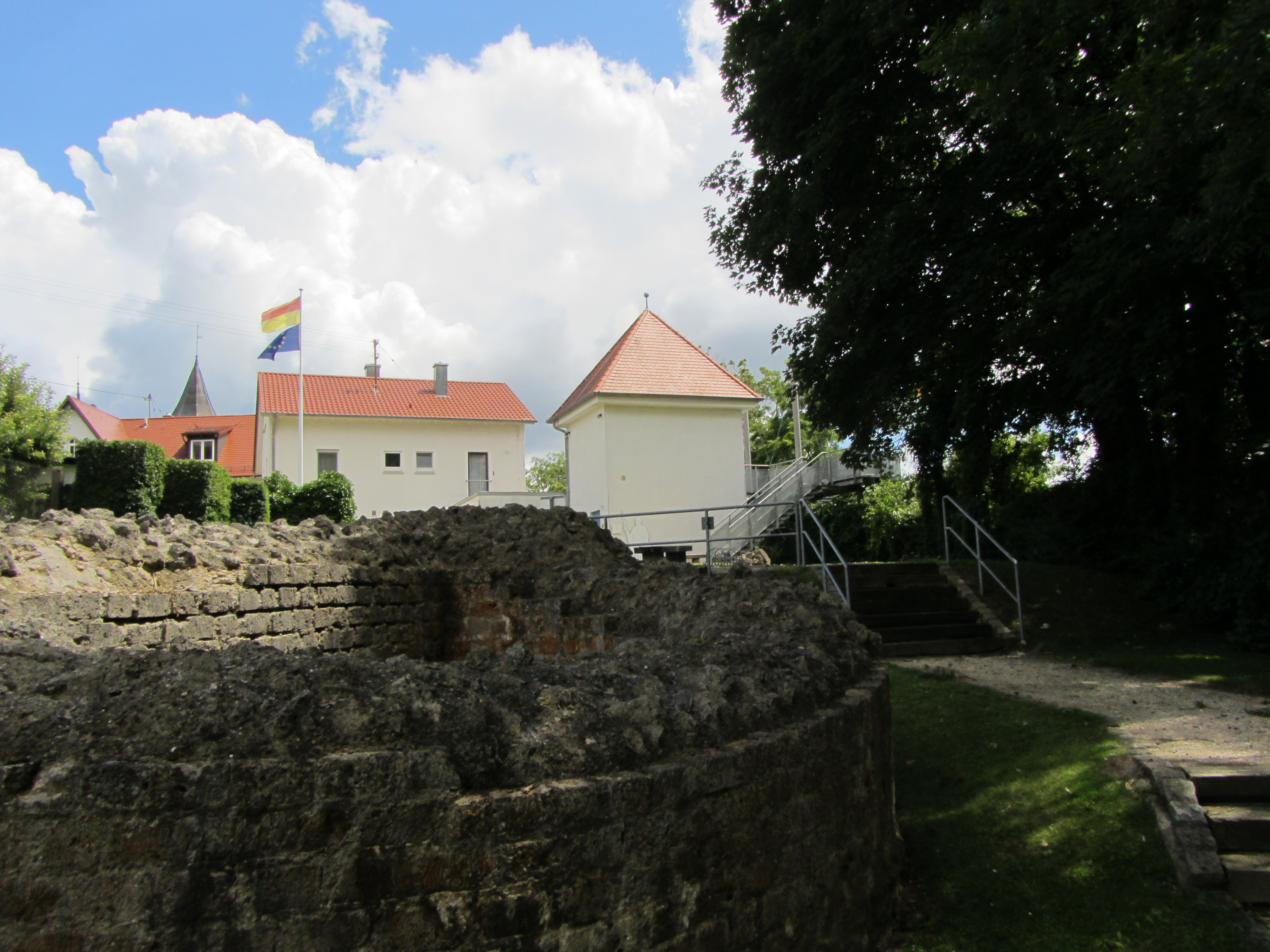 Archäologische Park Kellmünz - Römische Mauern und Turm in dem das Museum ist.